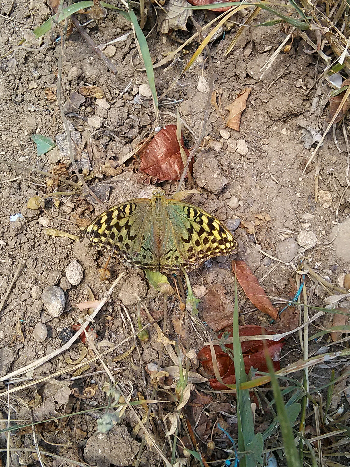 Перламутровка пандора в пгт. Кача, Севастополь